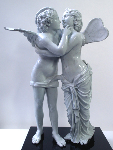 Amore e Psiche, gruppo plastico della manifattura Ginori a Doccia del XVIII secolo.